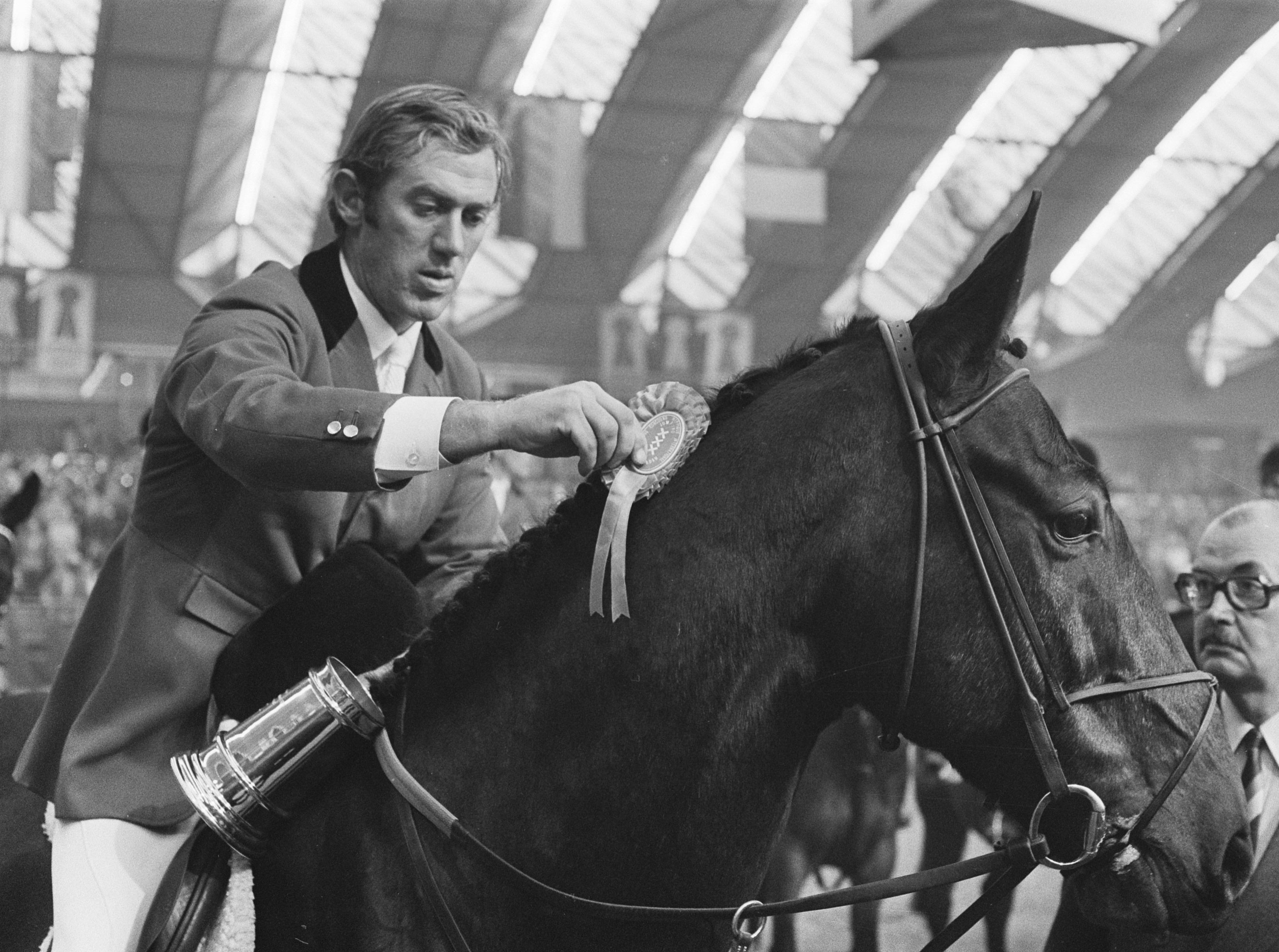 Jumping Amsterdam in RAI; winnaar GP, David Broome , speldt "Sportman" zijn rozet op.